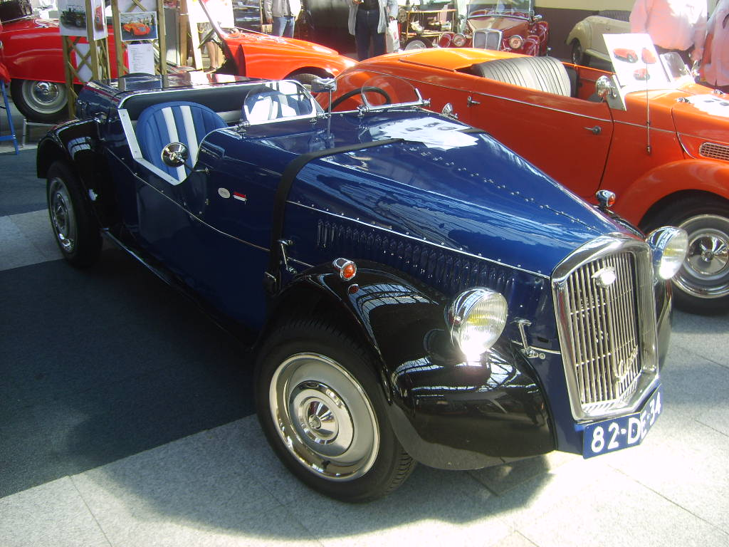 82-DE-34 Citromobile 2007